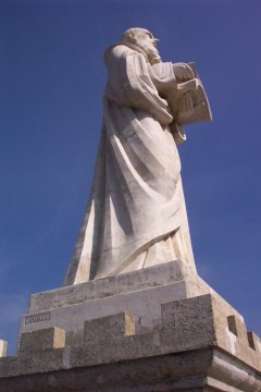 Ermitaño San Felices de Bilibio (m. 520) maestro de San Millán y Patrón de la localidad de Haro, La Rioja (España) Web oficial de la Cofradía de San Felices de Bilibio